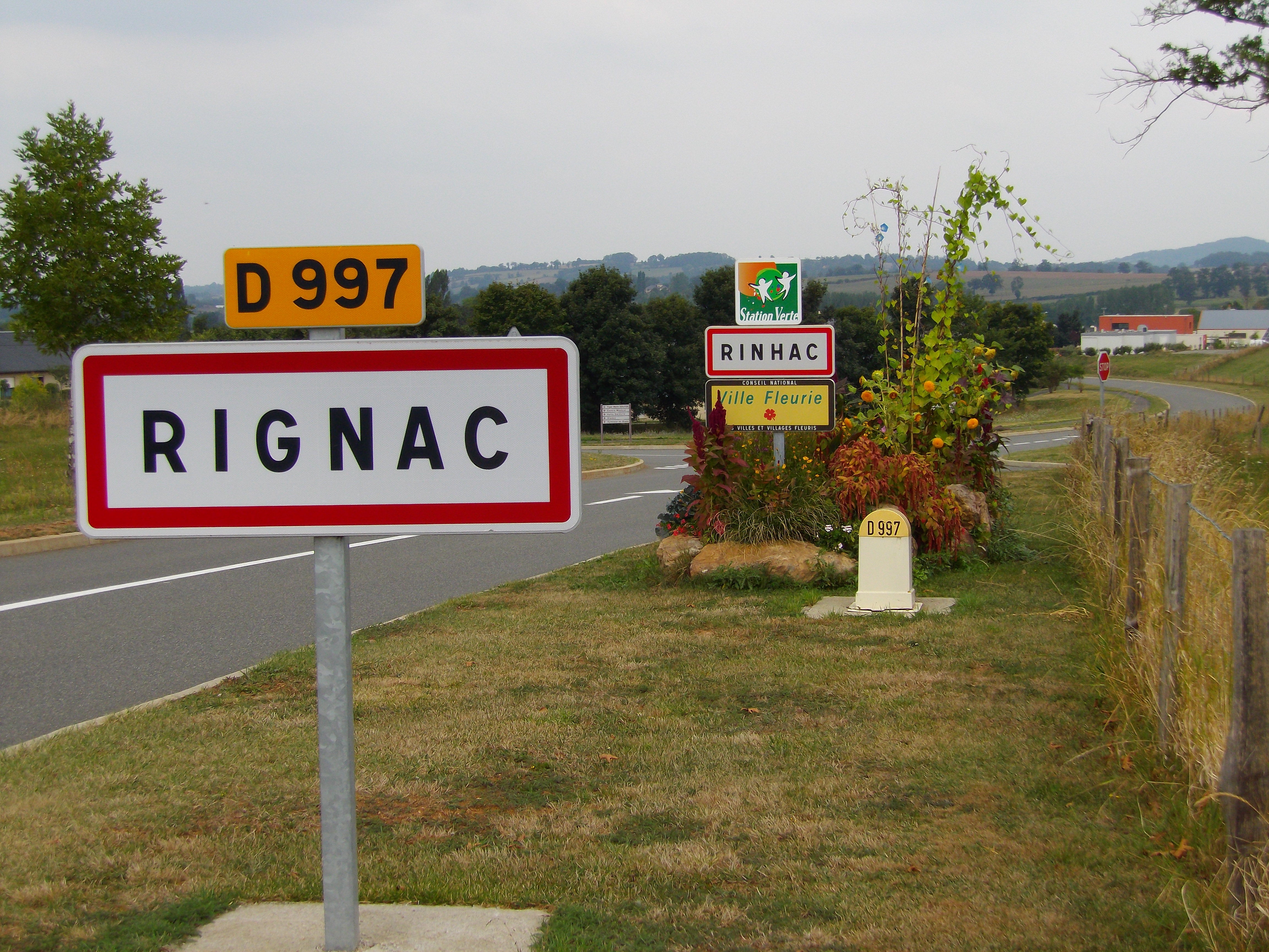 Signalisation bilingue français-occitan à l'entrée de Rignac (Aveyron, France)